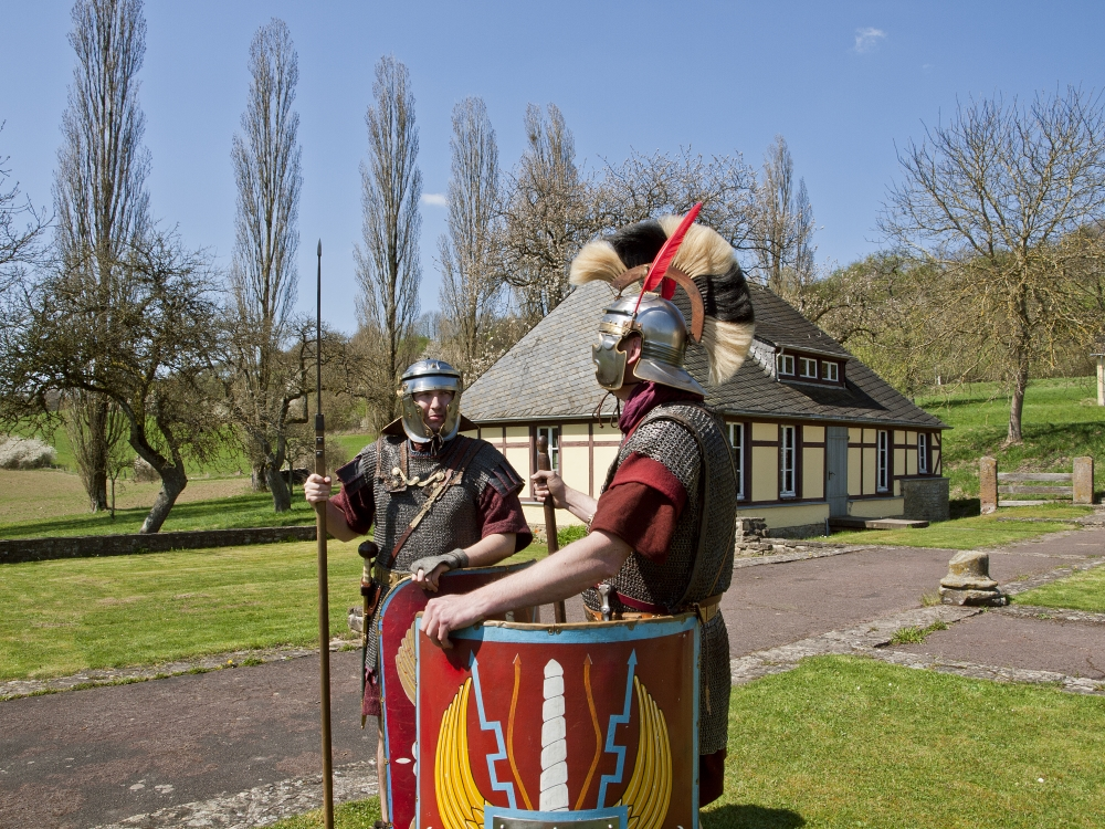 Römerlager auf Villa Otrang